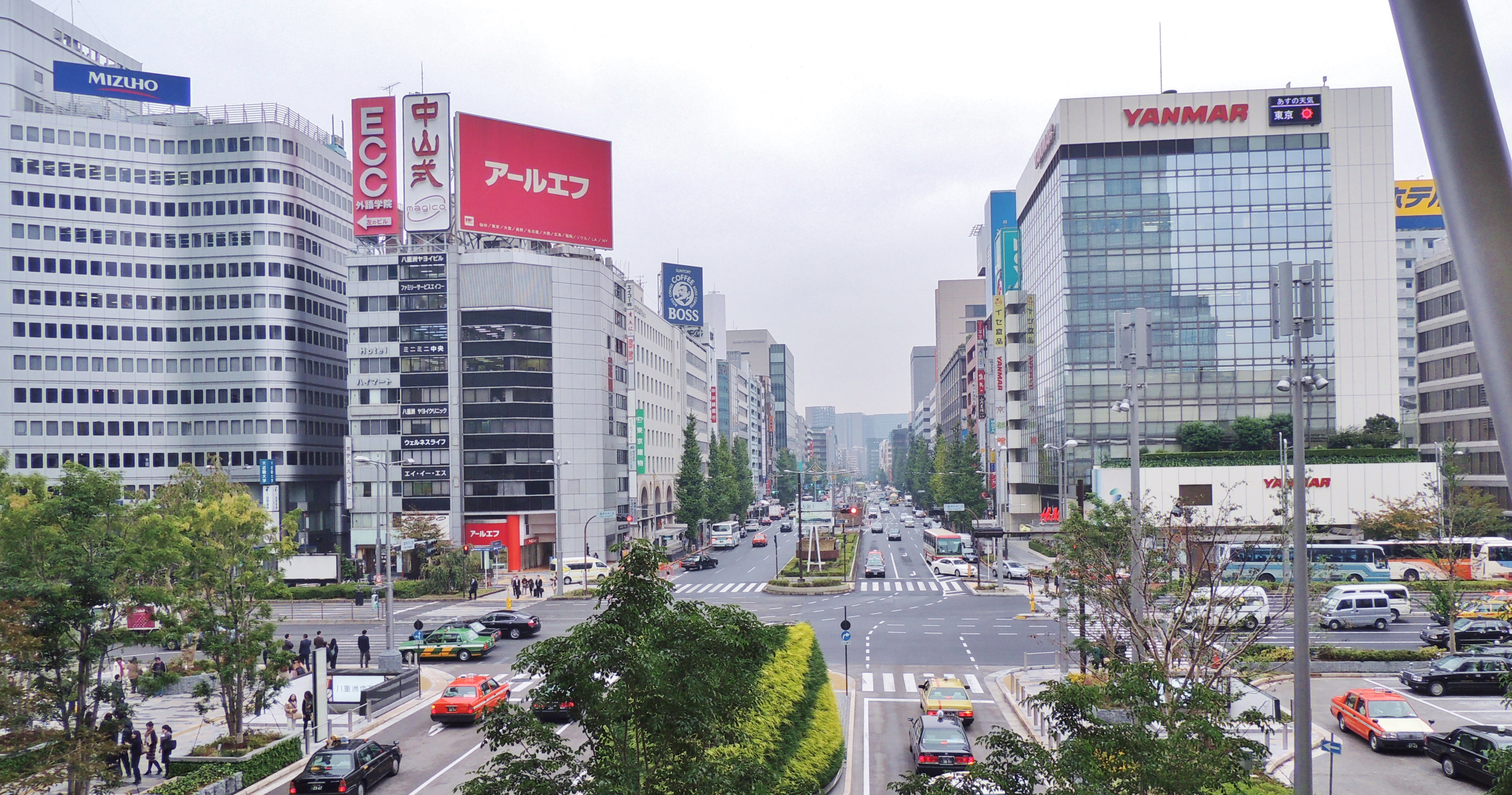 東京駅 八重洲